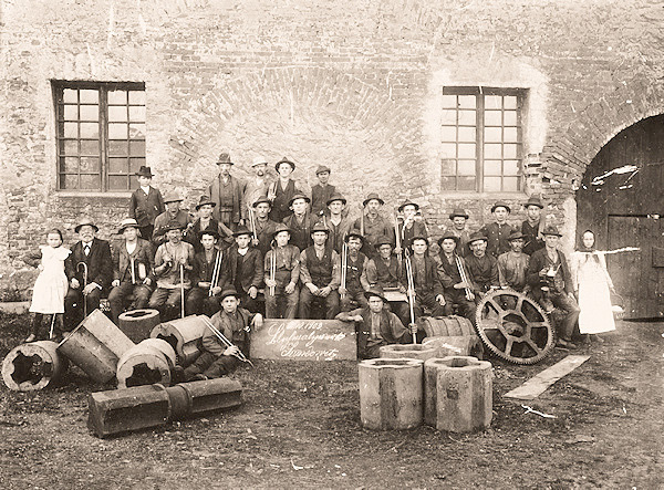 Pracownicy Żędowickiej Huty z roku 1909.